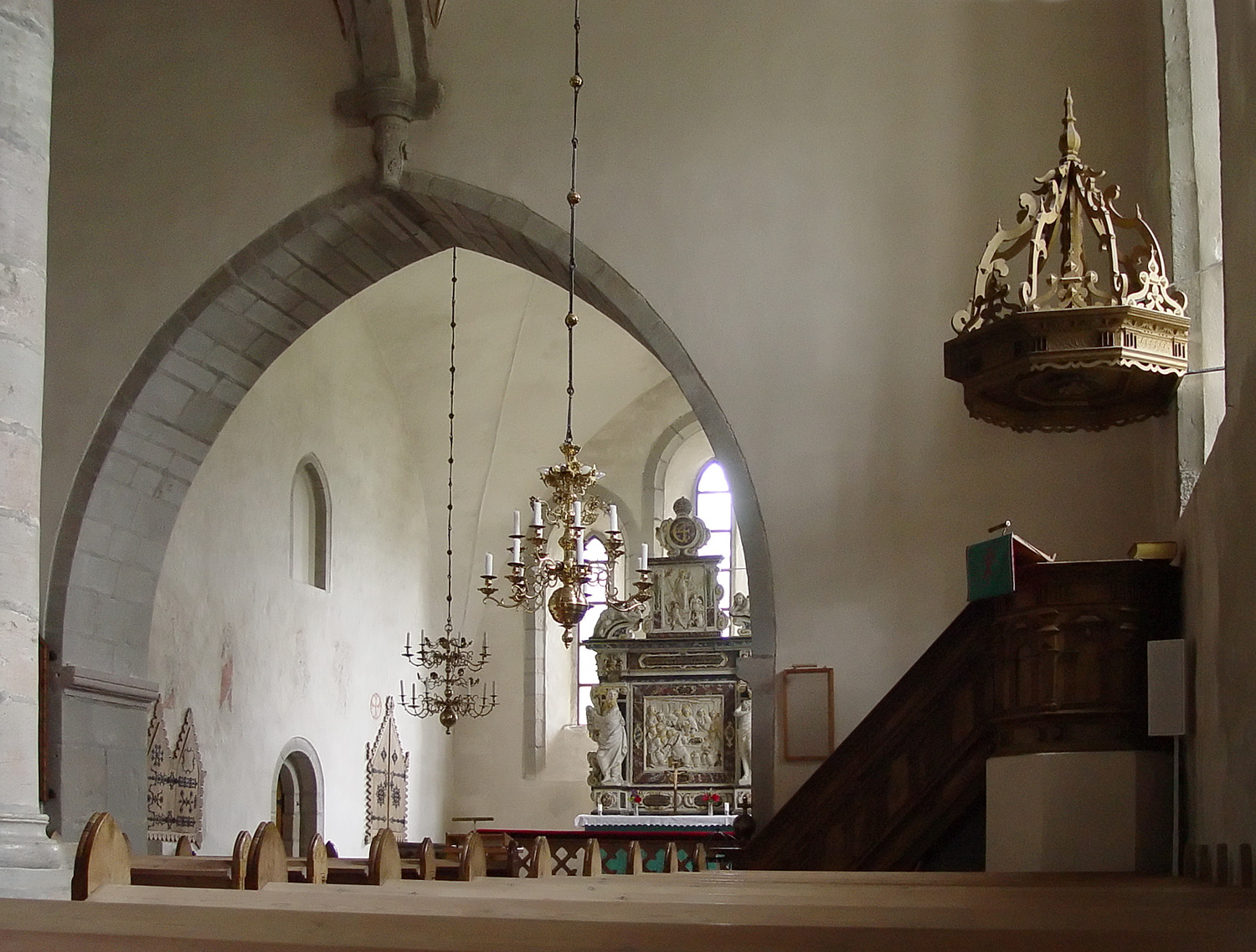 Hablingbo kyrka auf Gotland: )